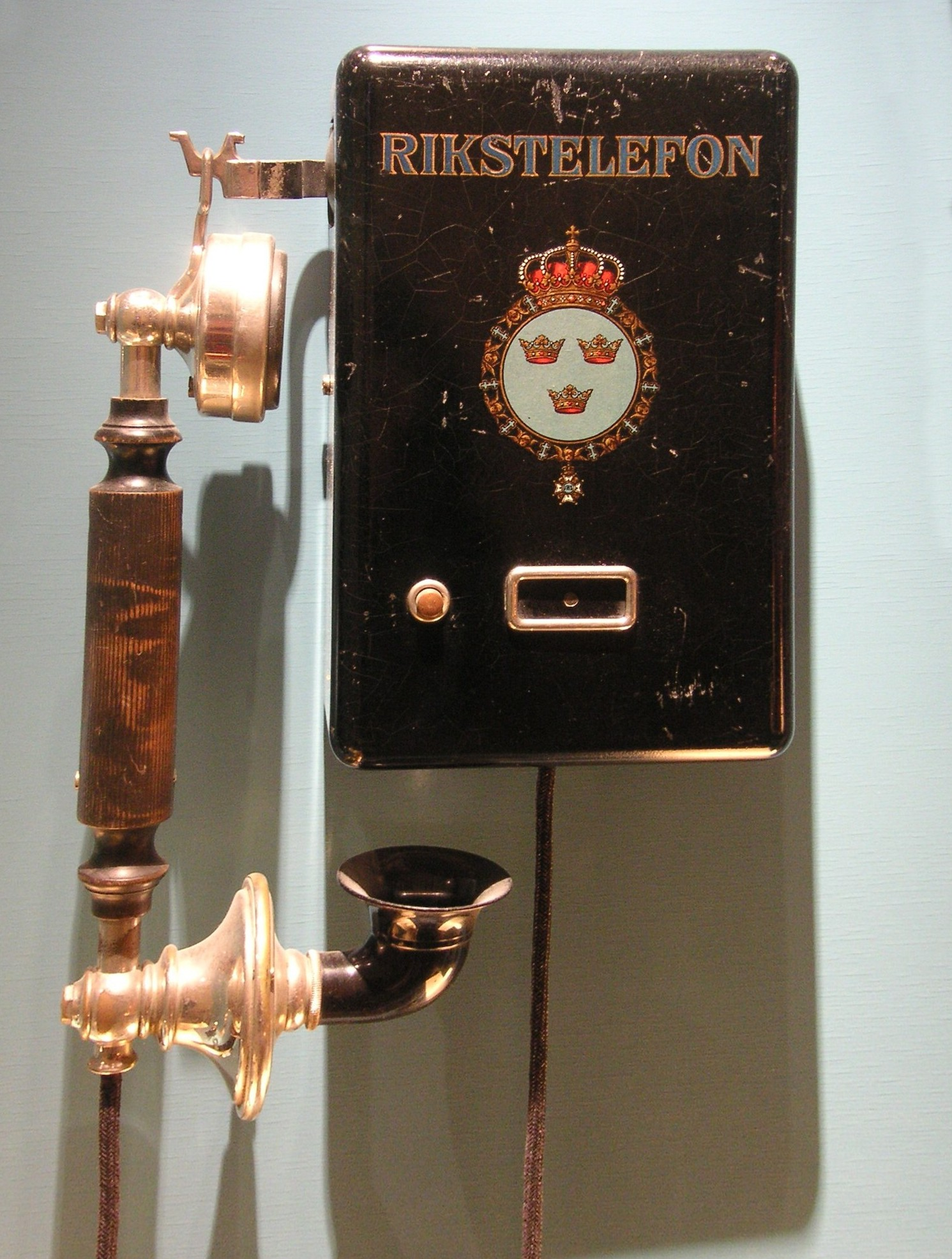 Svensk väggtelefon från 1920-talet